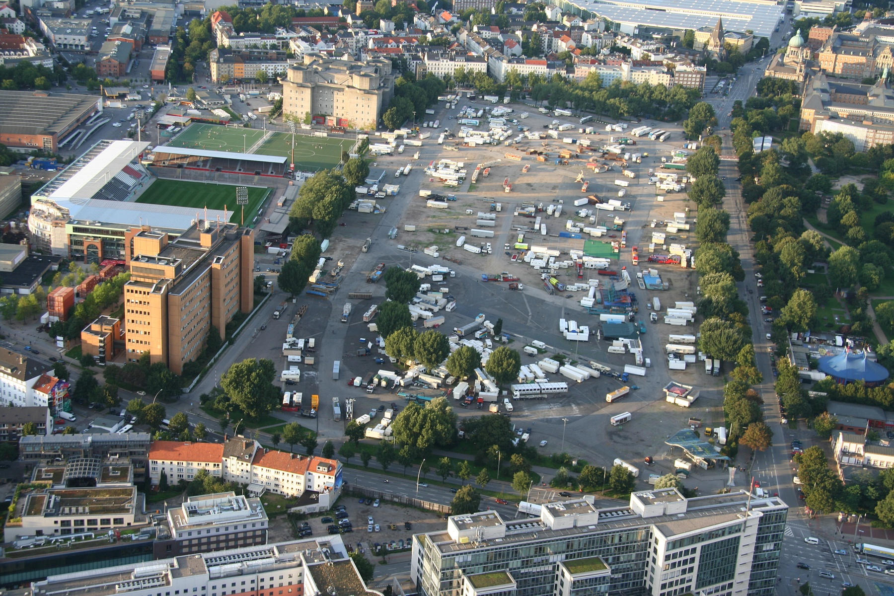 Heiligengeistfeld aus Richtung Millerntor